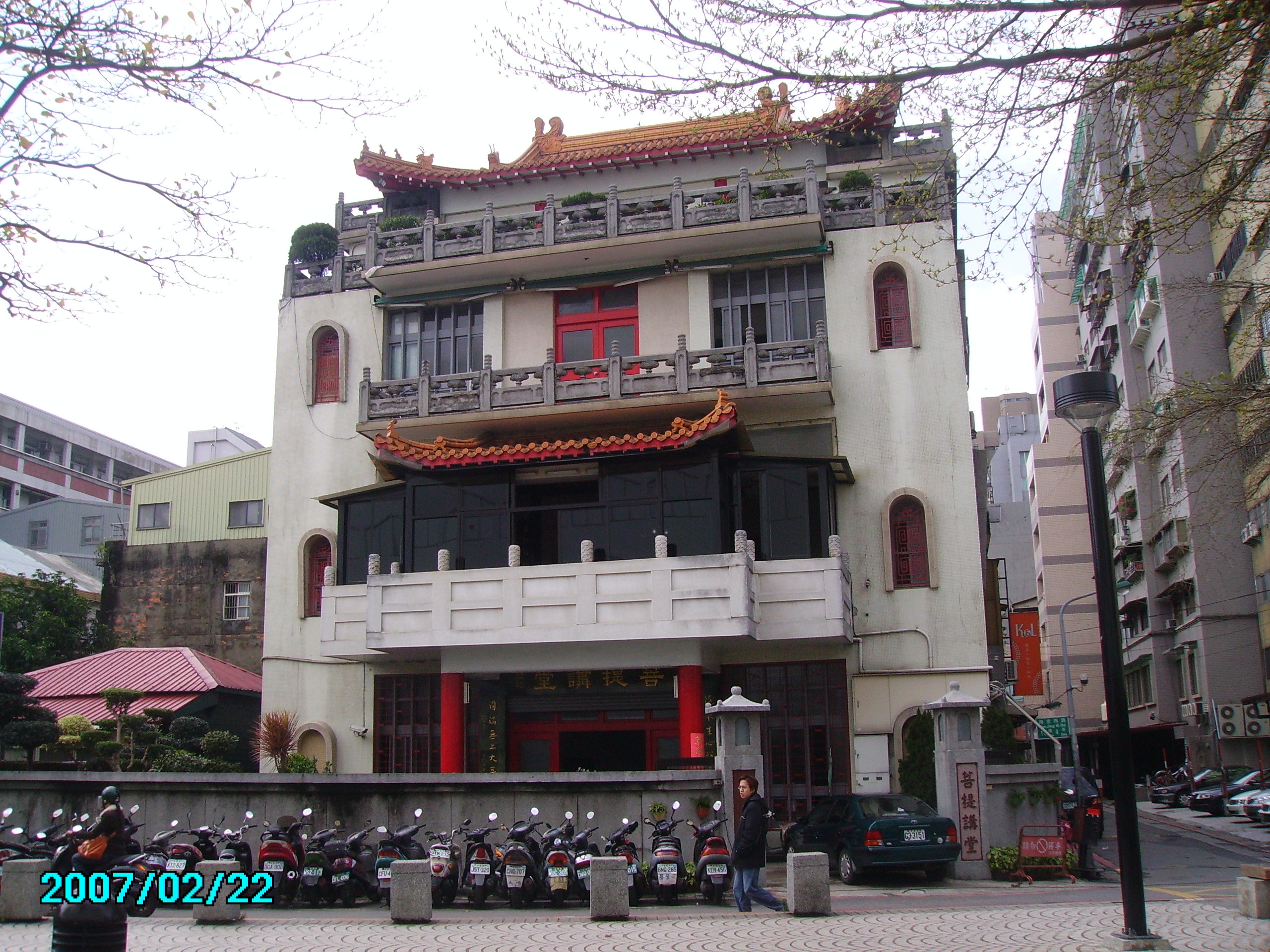 臺北市大同區菩提講堂。